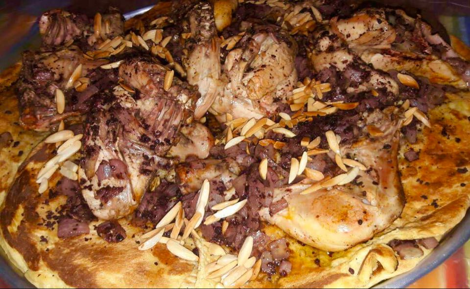 طبق مسخن مصنوع في الأردن من الدجاج والسماق والبصل